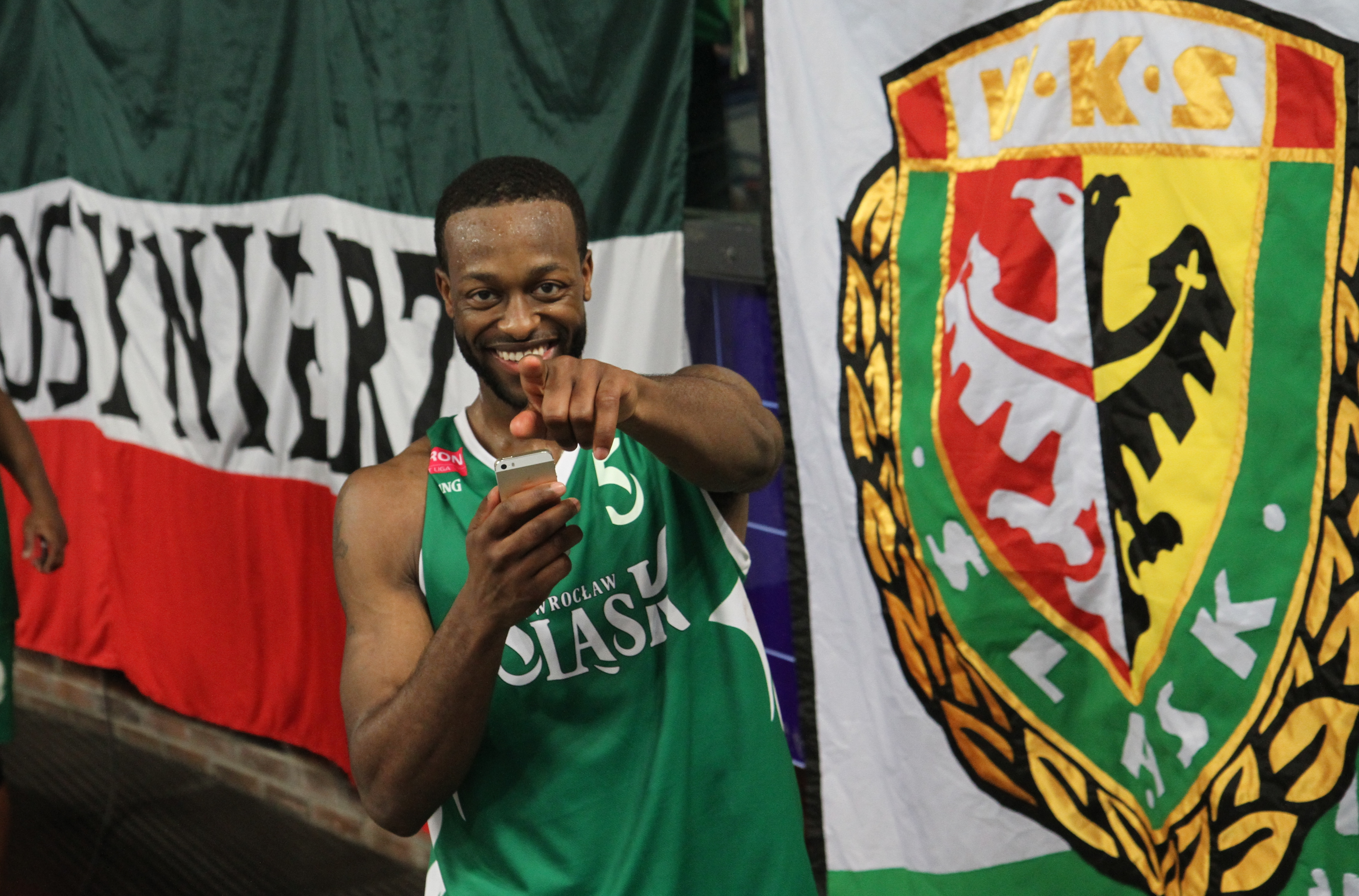 Dominique Johnson, Śląsk Wrocław